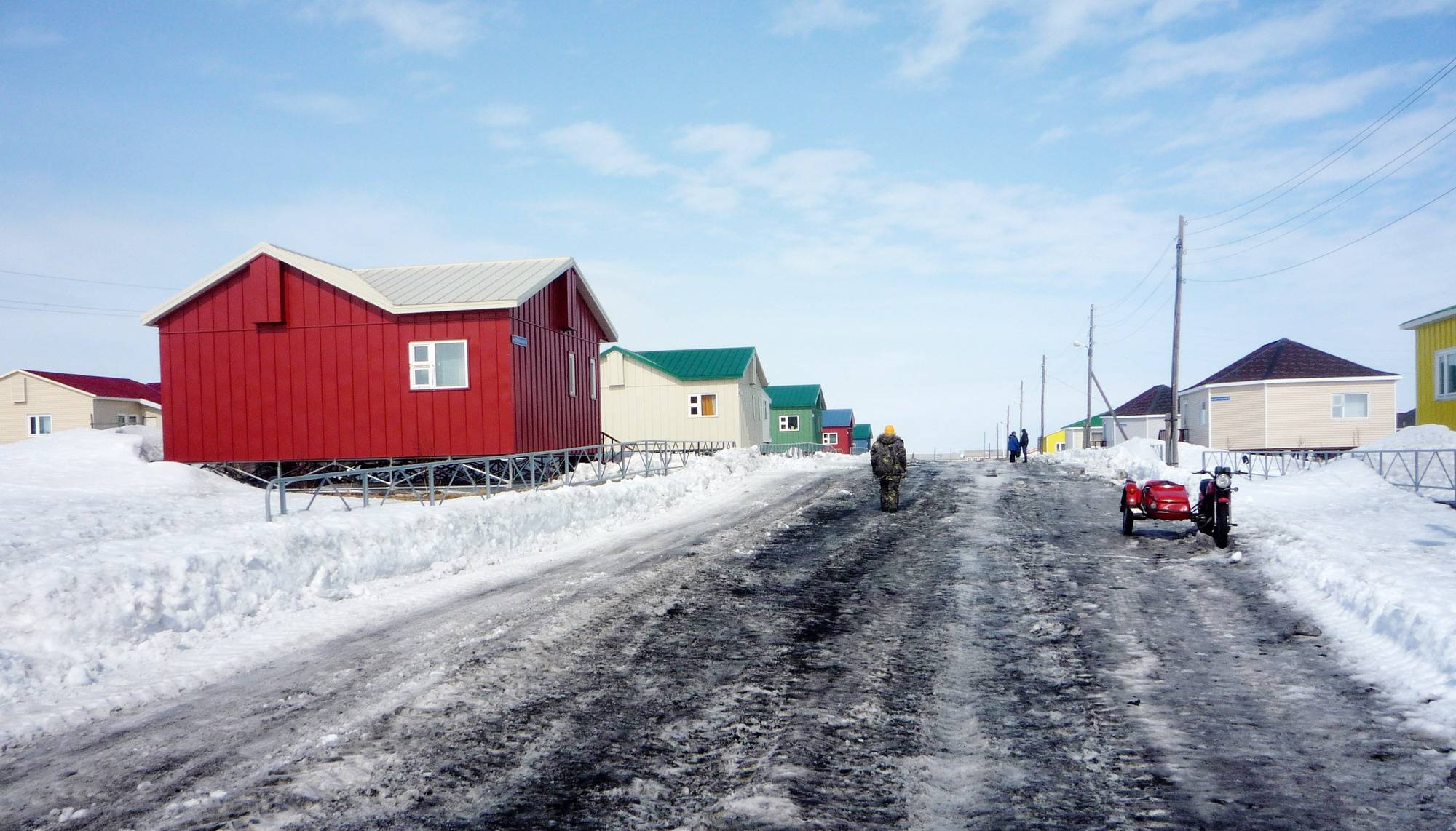 Село Канчалан